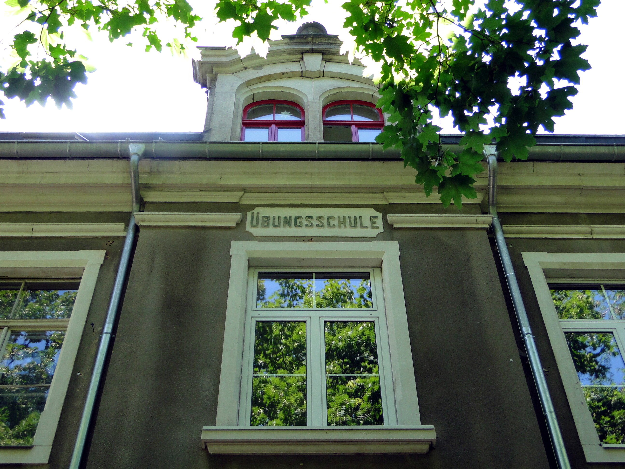 frühere Übungsschule des Fletcherschen Lehrerseminars in Dresden, Detail; heute Teil der Waldorfschule Dresden